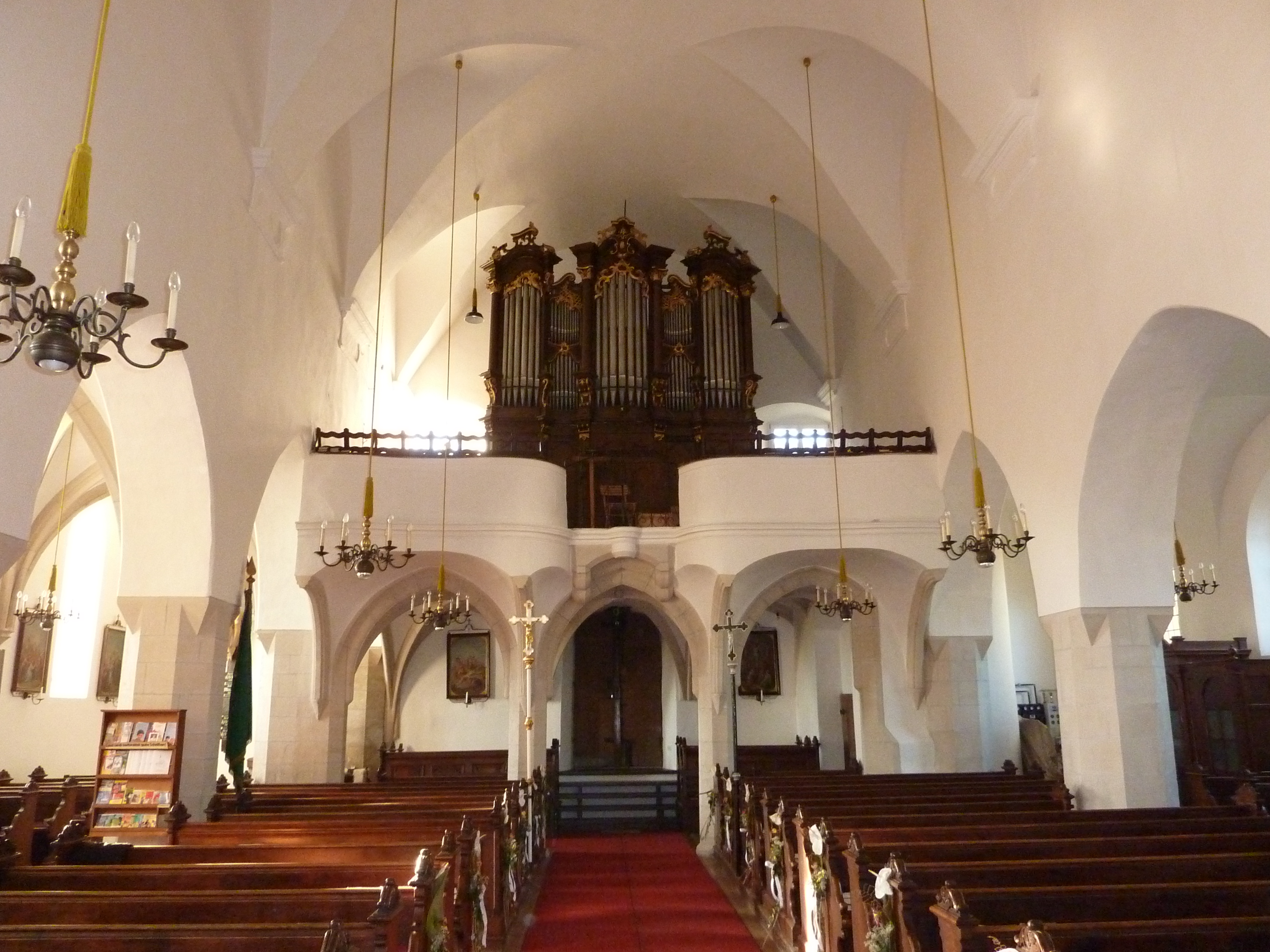 Pfarrkirche Mariae Geburt, Gobelsburg, Langenlois, Niederösterreich - Orgelempore mit Orgel von Franz Capek, 1895